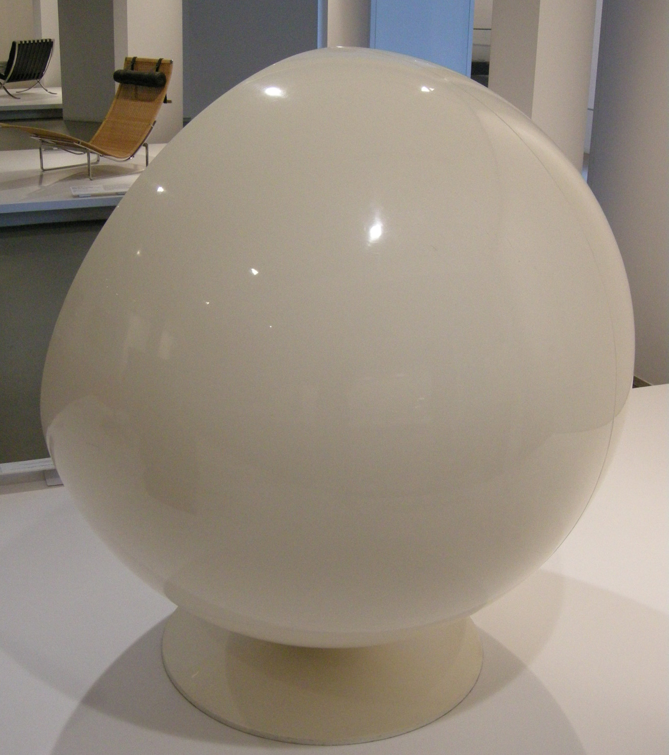 Ngv design, eero aarnio, globe chair 1963-65